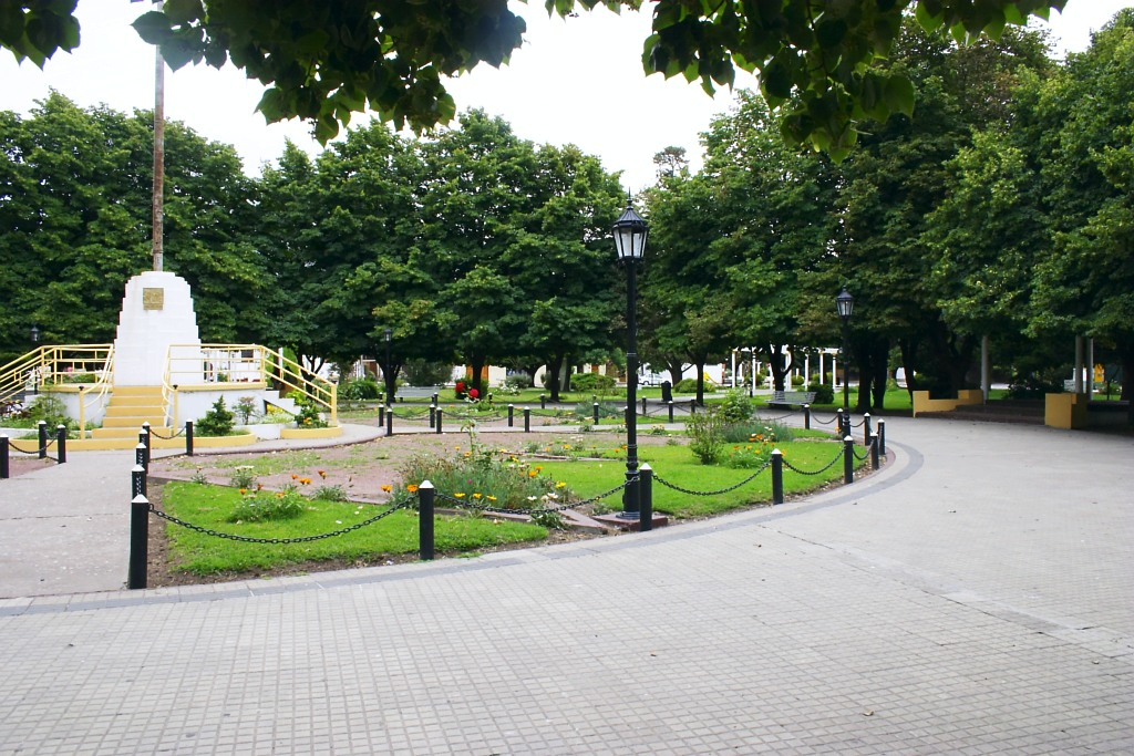 Centro de la plaza Colón, América, Rivadavia, Buenos Aires, Argentina